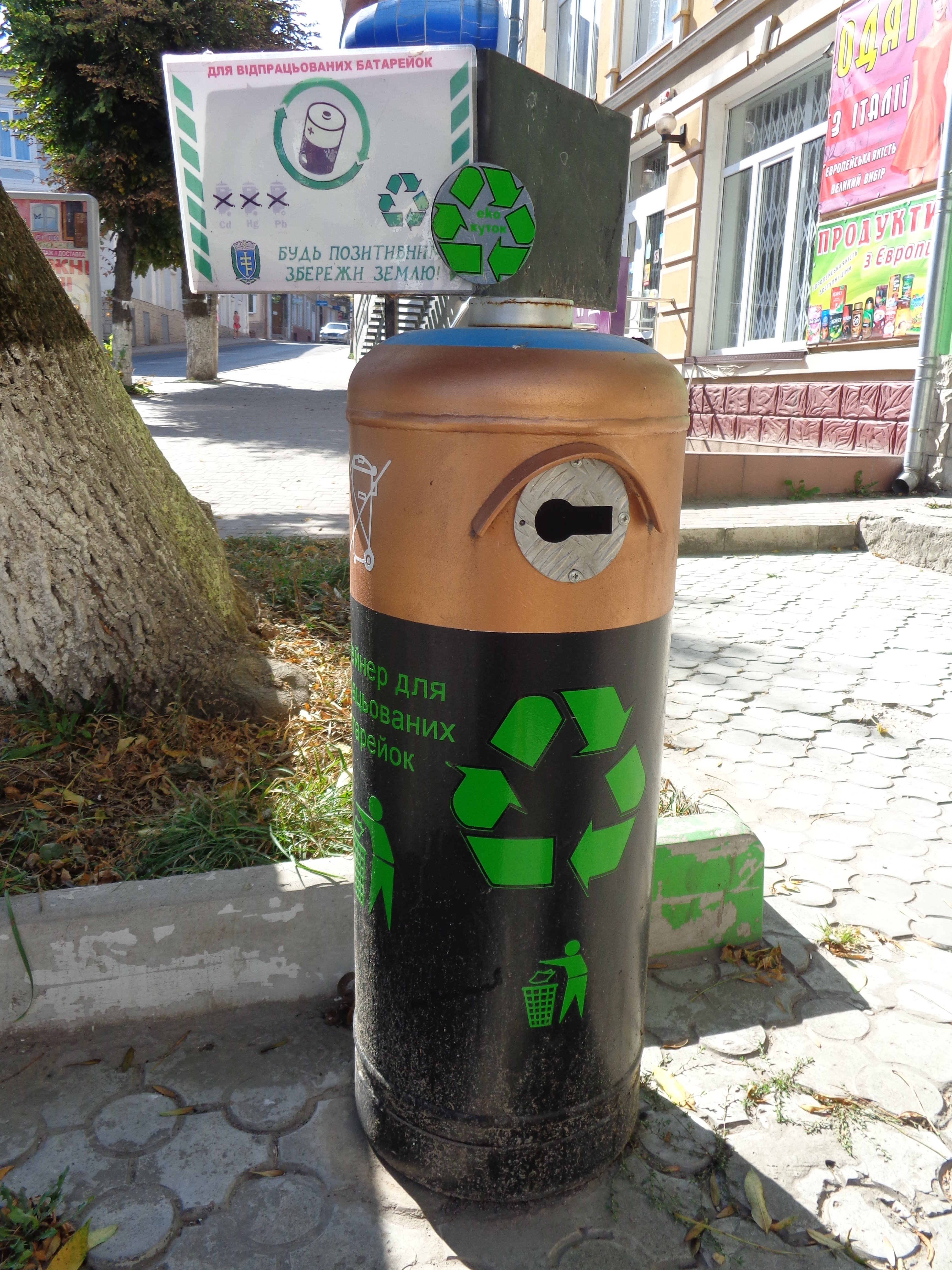 Контейнер для відпрацьованих батарейок, встановлений в Бучачі активістами «Бучач-АРТу»